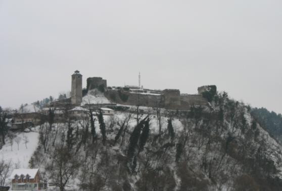 Maglajska tvarđava zimi